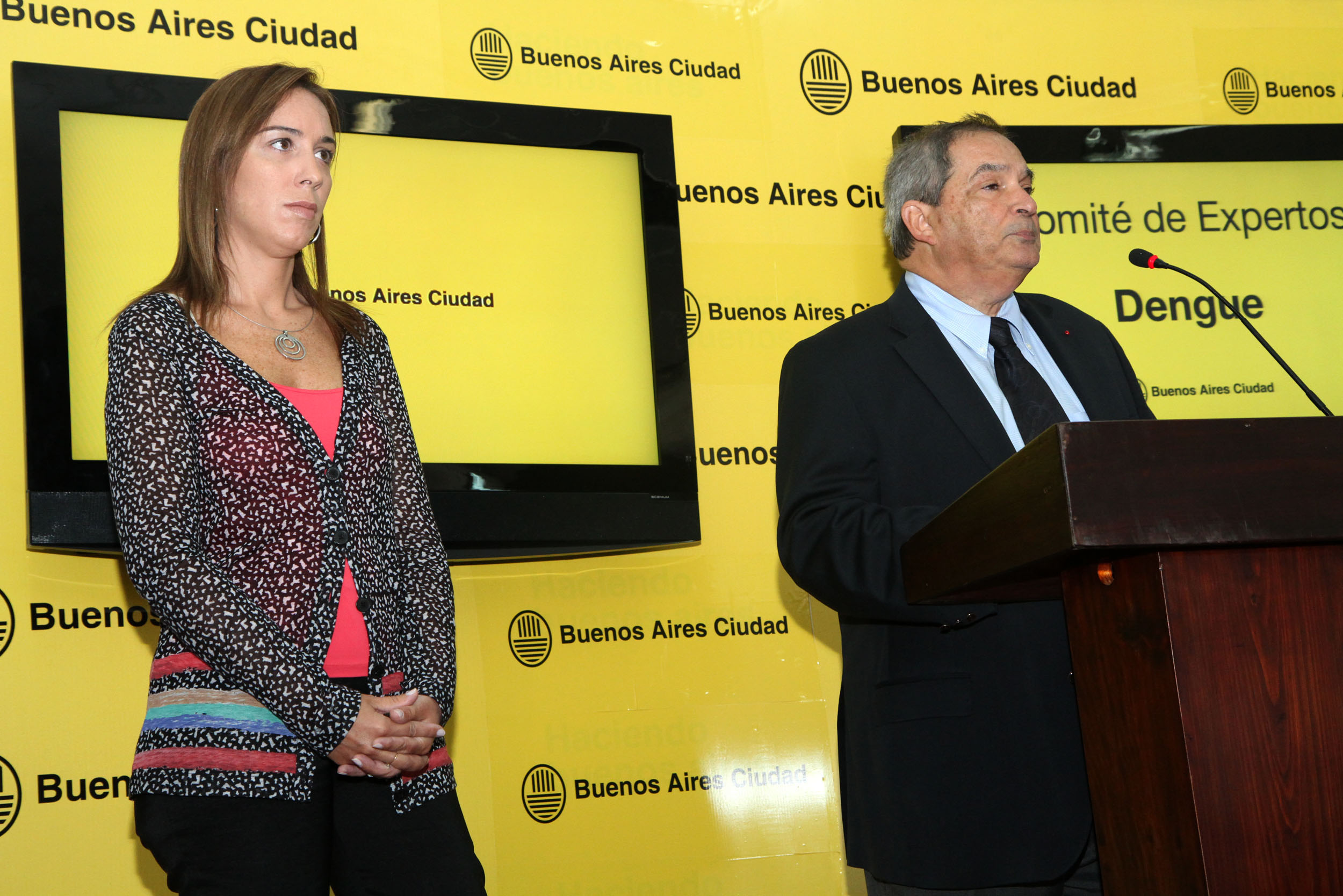 Buenos Aires, 9 de febrero de 2012- La Vicejefa de Gobierno de la Ciudad, María Eugenia Vidal, y el Ministro de Salud, Jorge Lemus, junto al grupo de expertos del Gobierno porteño, ofrecieron una conferencia de prensa sobre "dengue" en la sede del Ministerio, en la mañana de hoy. Foto: Sandra Hernández/GCBA